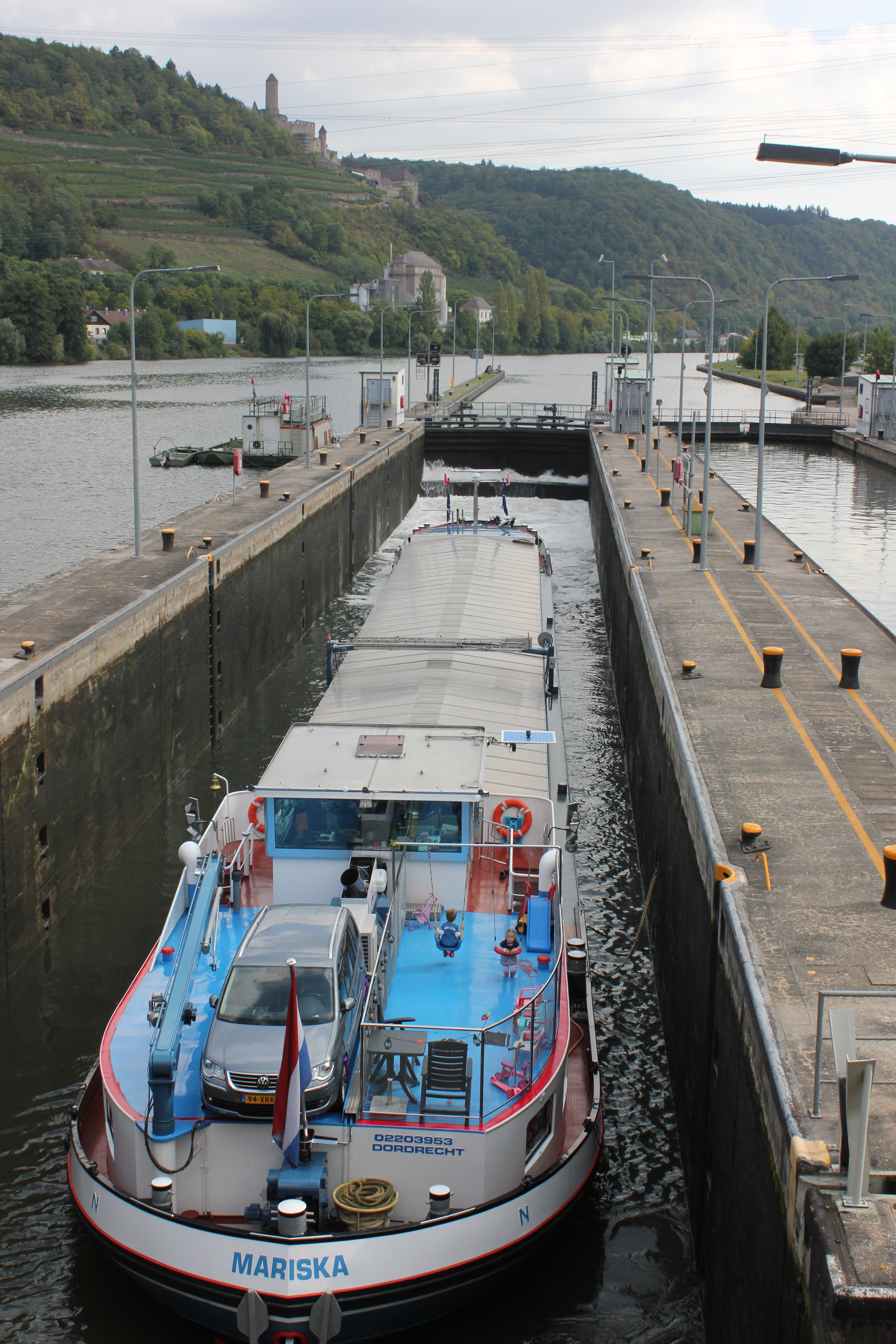 Schleuse Neckarzimmern beim Anheben eines Schiffes mit Fahrtrichtung neckaraufwärts